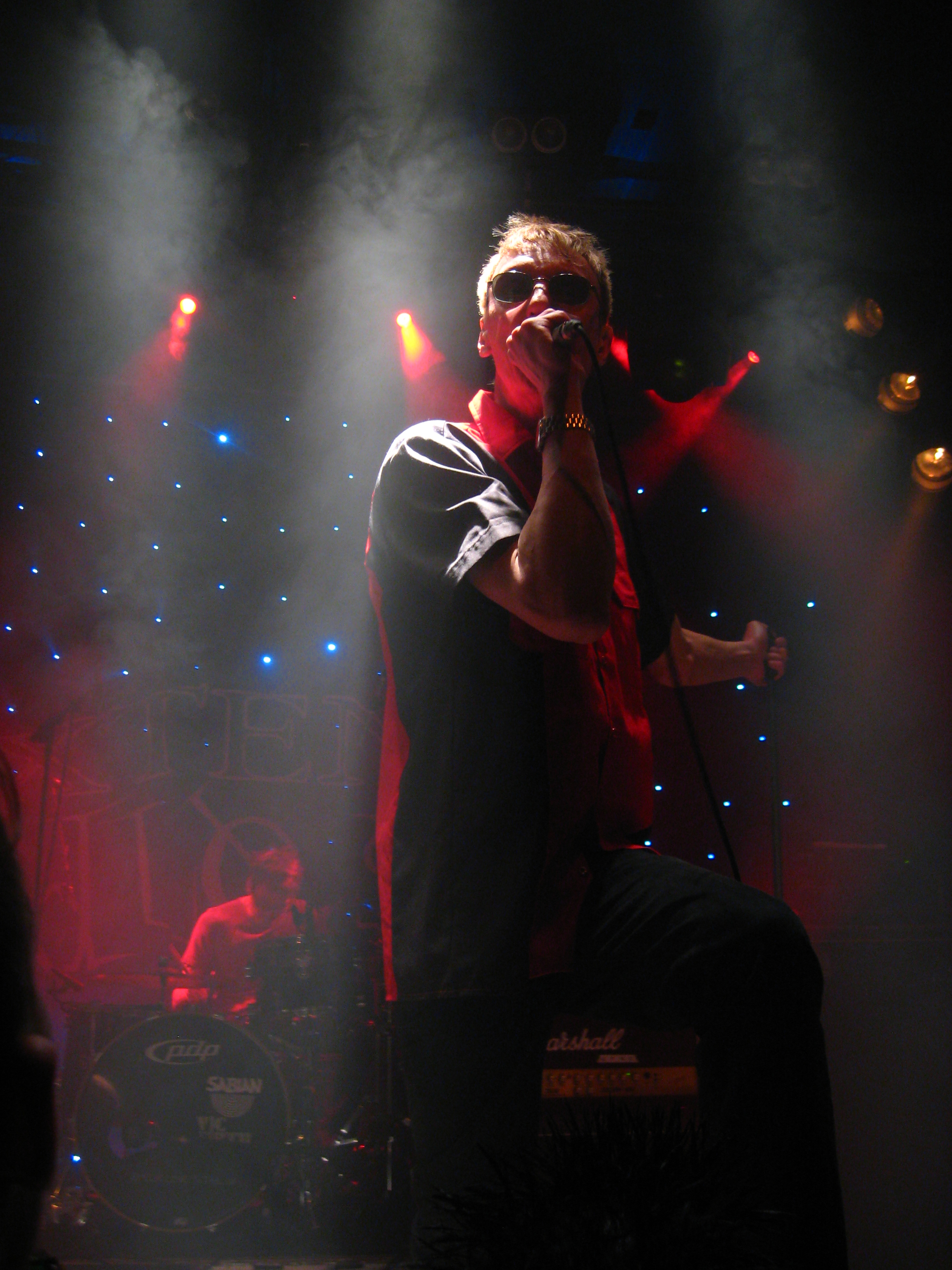 Sixten Redlös playing at Punkgala in Stockholm April 2010.